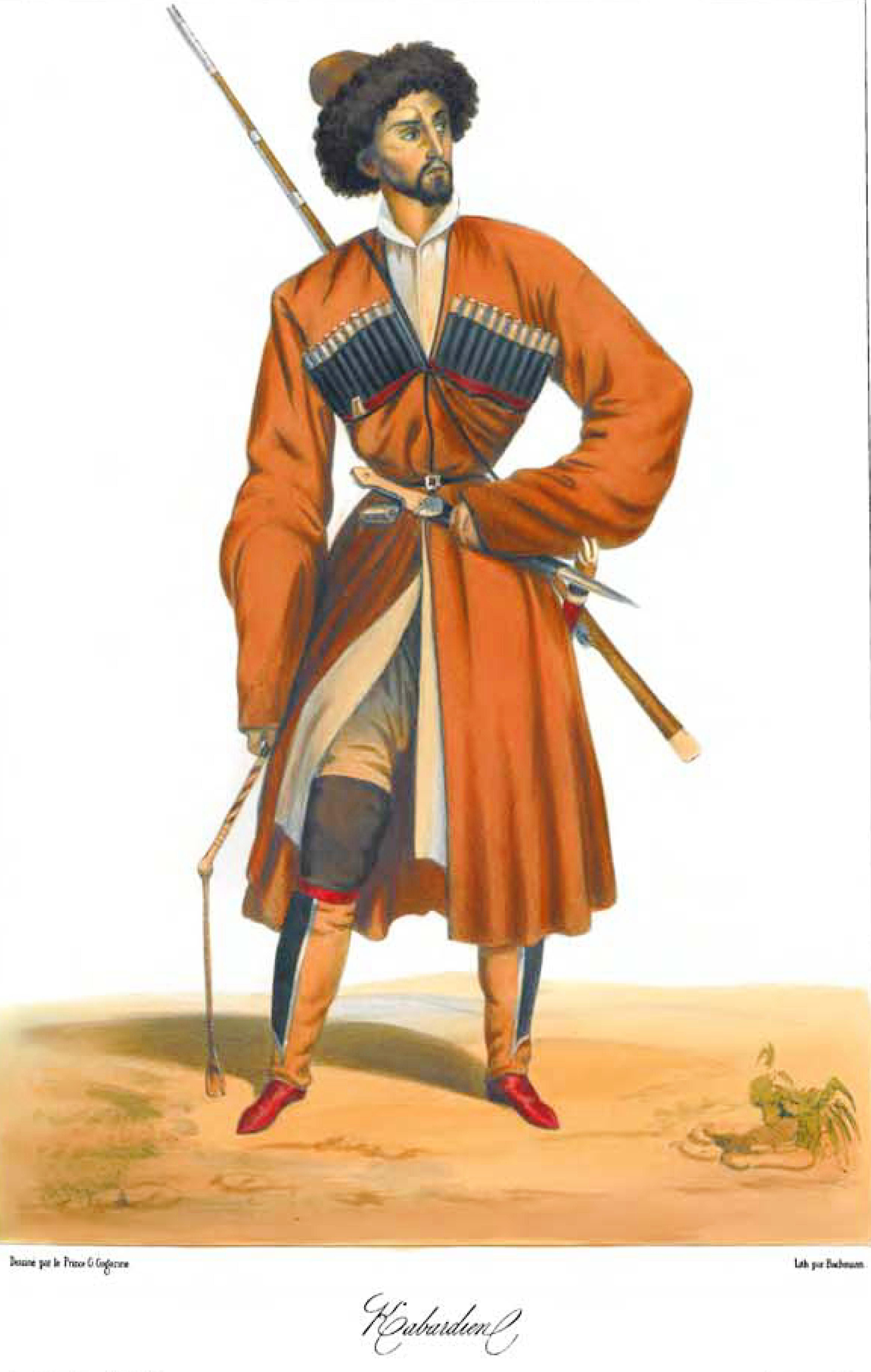 Scènes, paysages, moeurs et costumes du Caucase dessinés d'aprés nature par le prince G. Gagarine.